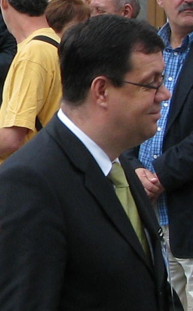 Damir Bajs